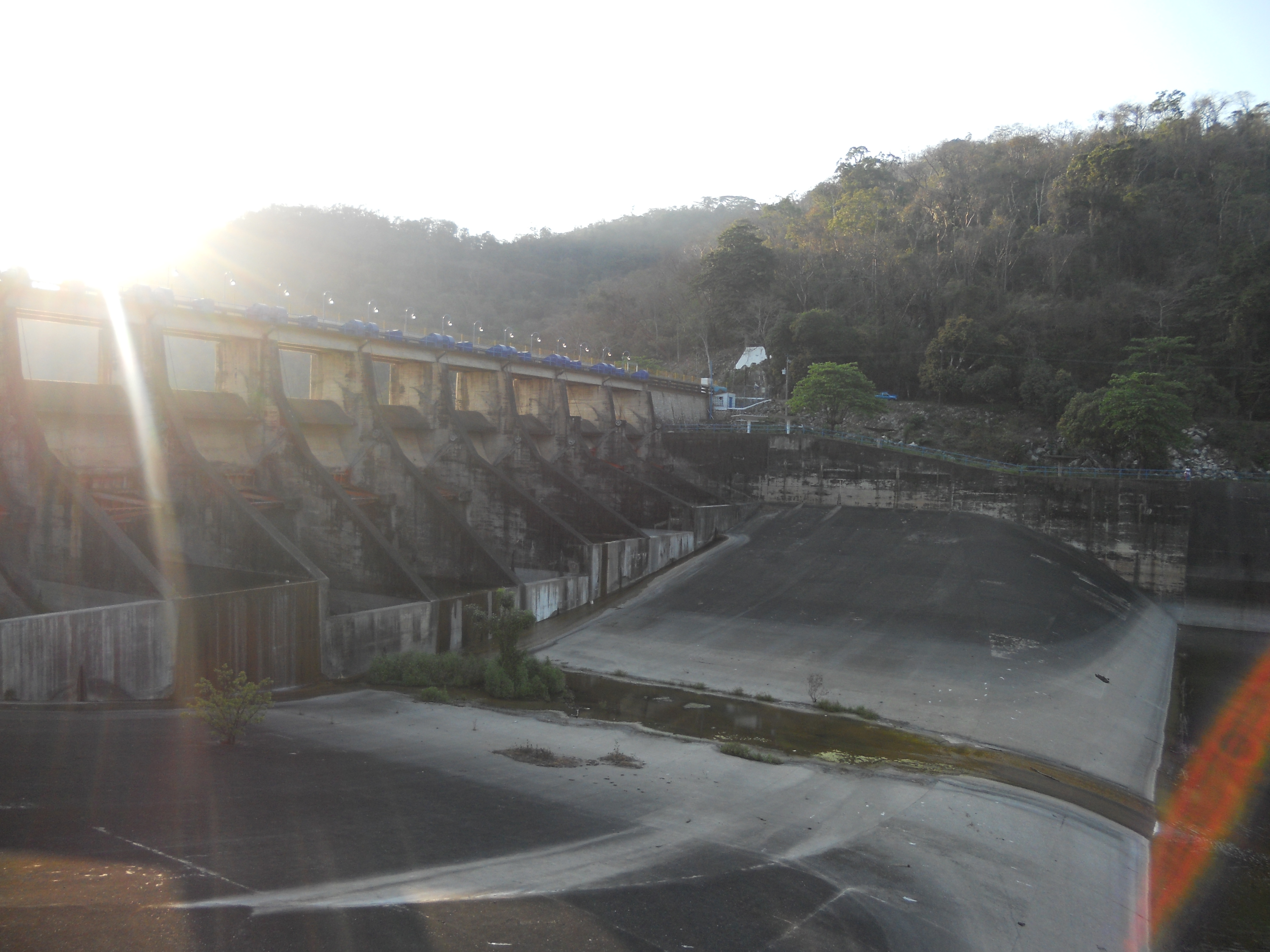 Toma frontal de las compuertas de la presa Temascal